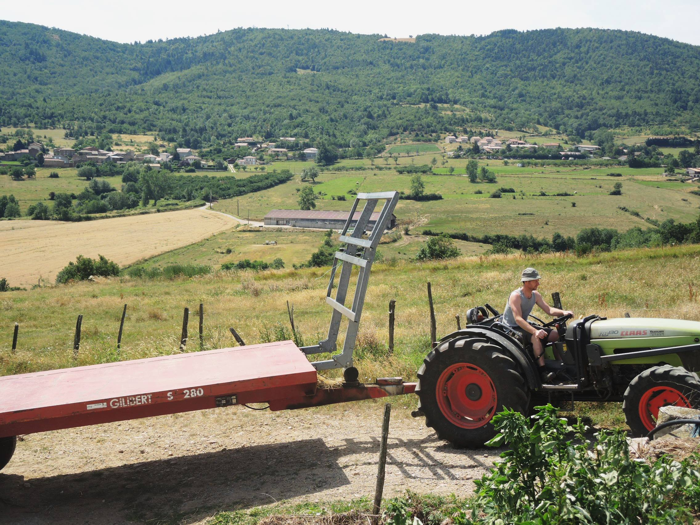 Brossainc détail